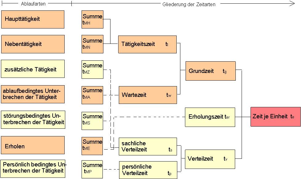 Gliederung der Zeit je Einheit nach REFA